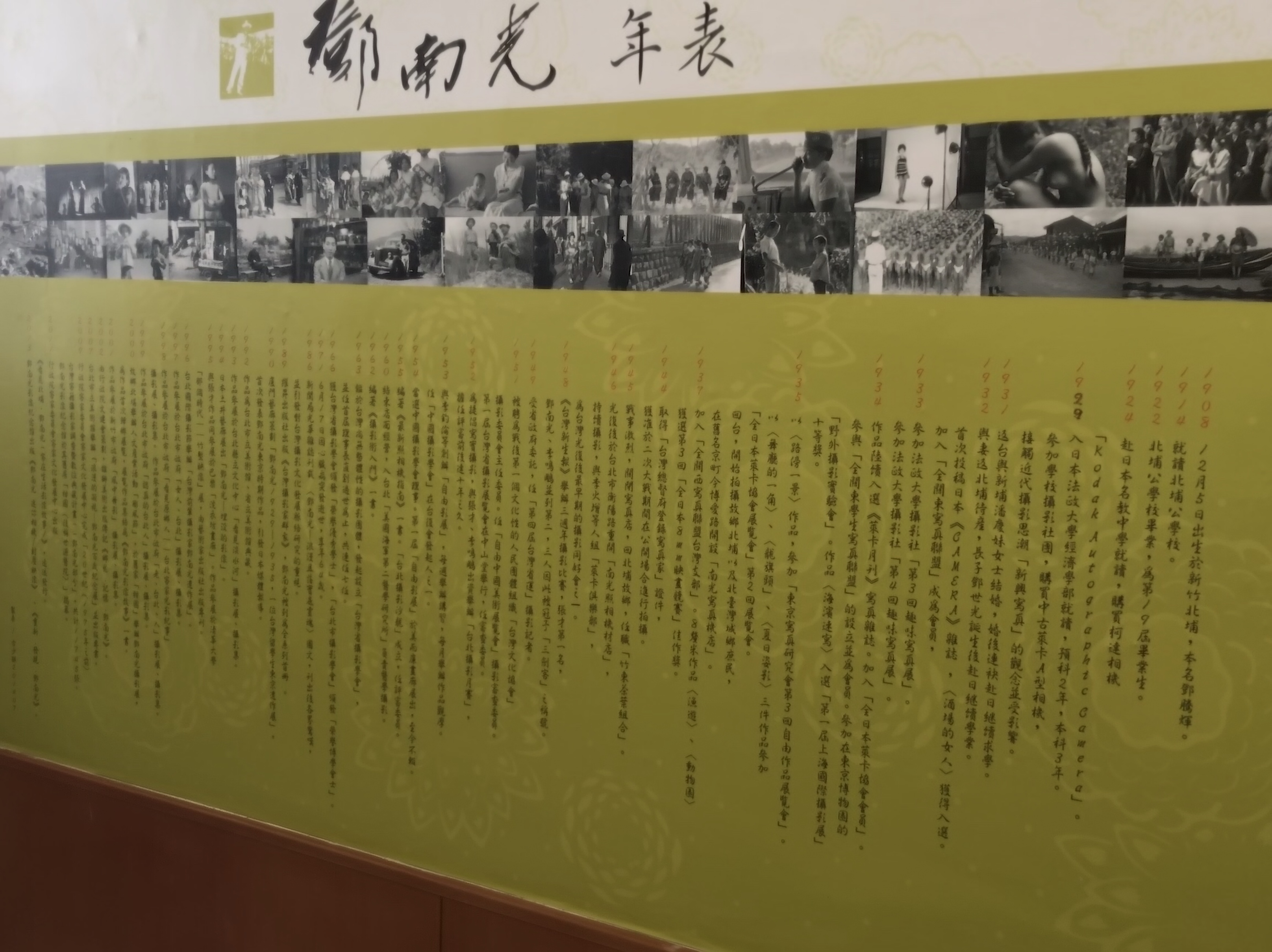 鄧南光攝影紀念館鄧南光年表